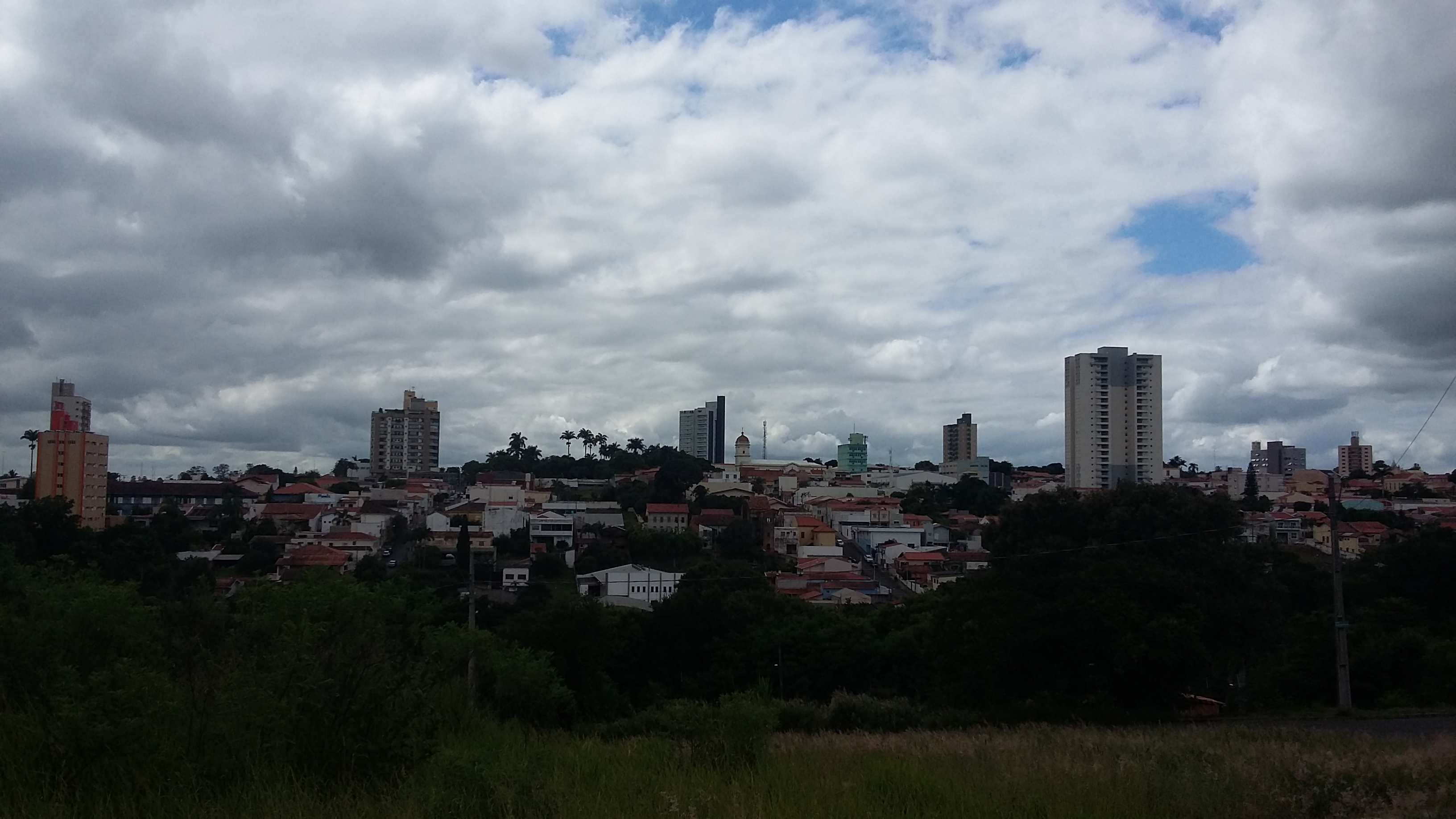 Vista de Tietê a partir do Jardim Rodrigues de Morais